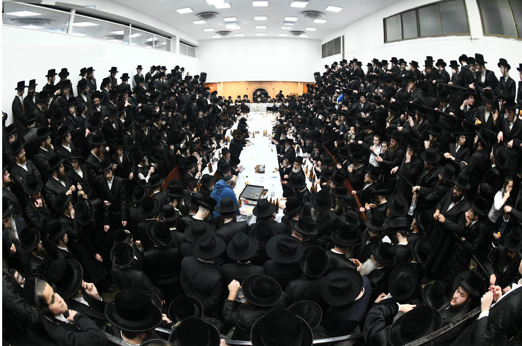 טיש בחסידות נדבורנה